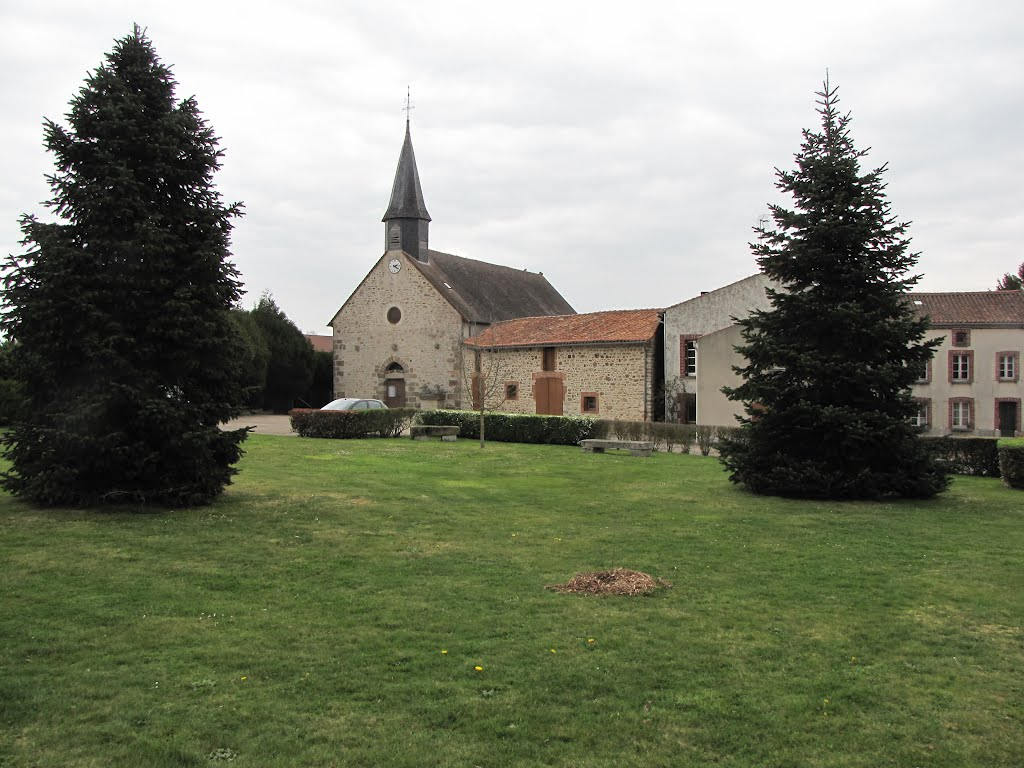 L'église de Blanzac